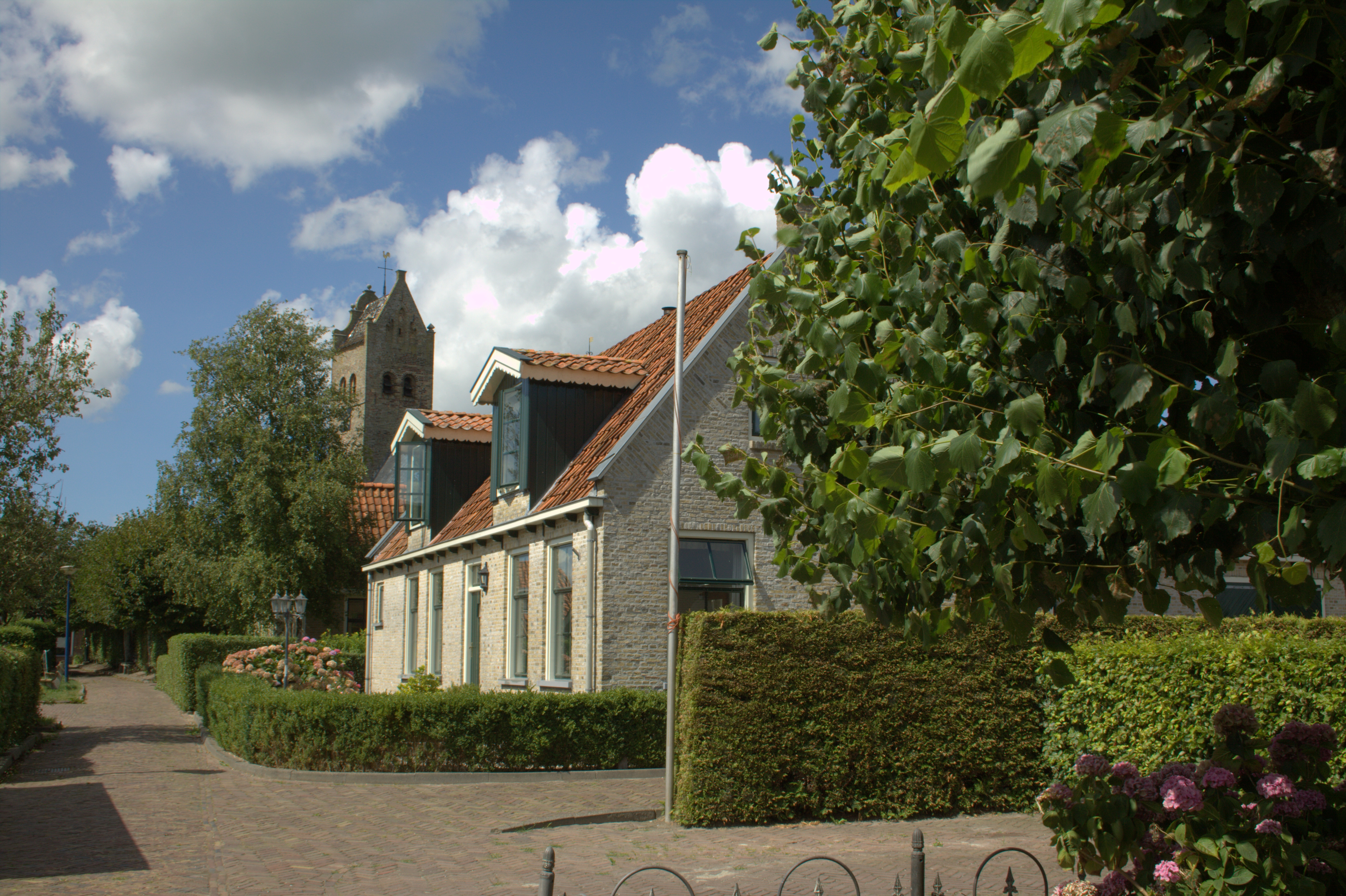 Dorpsgezicht van Hilaard in Friesland.